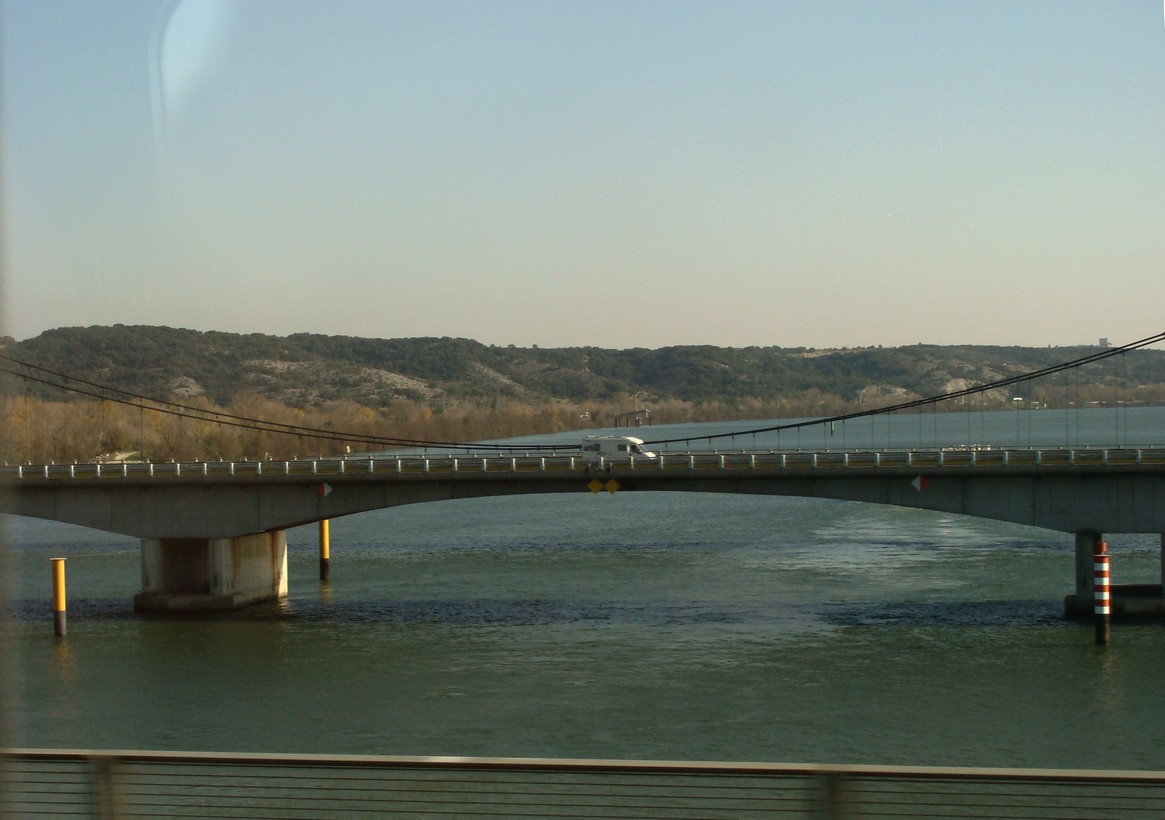 Le franchissement du Rhône par l'autoroute française A9 entre Châteauneuf-du-Pape (Vaucluse) et Roquemaure (Gard), vu du viaduc du TGV Méditerranée.